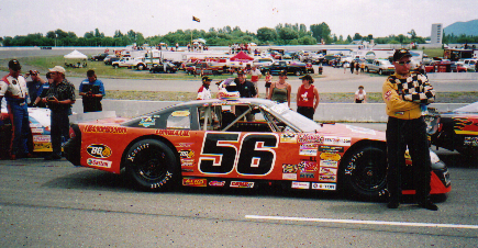 Marc Beaudoin à Sanair le 26 juin 2005. Photo Paul-Émile Poulin-Jacques